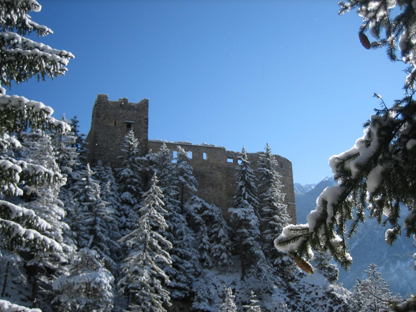 Burg Belfort Rumantsch: Casti da Belfort